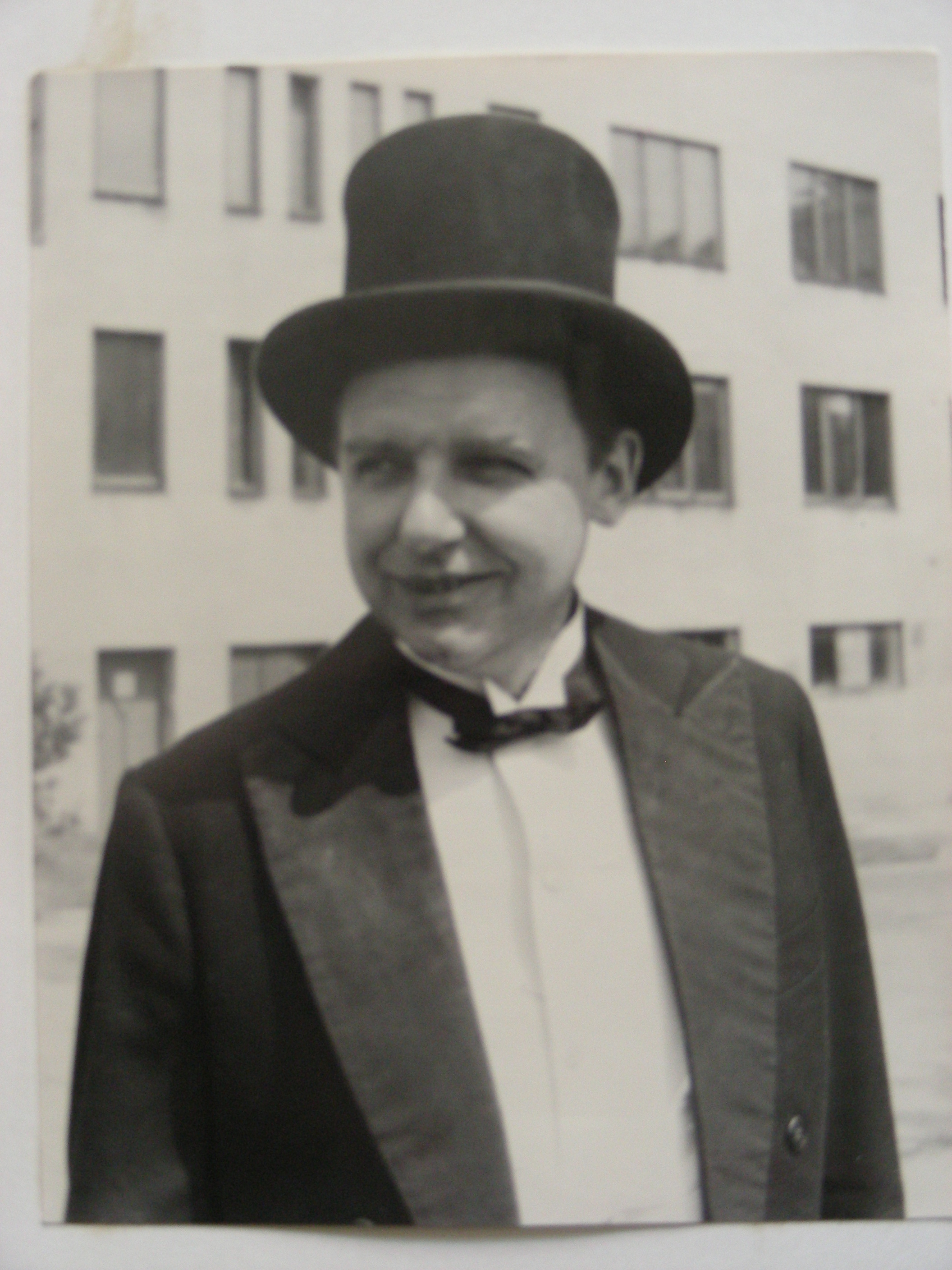 z natáčení filmu Král komiků (1963)